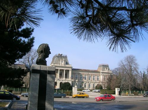 Prefectura Judetului Calarasi